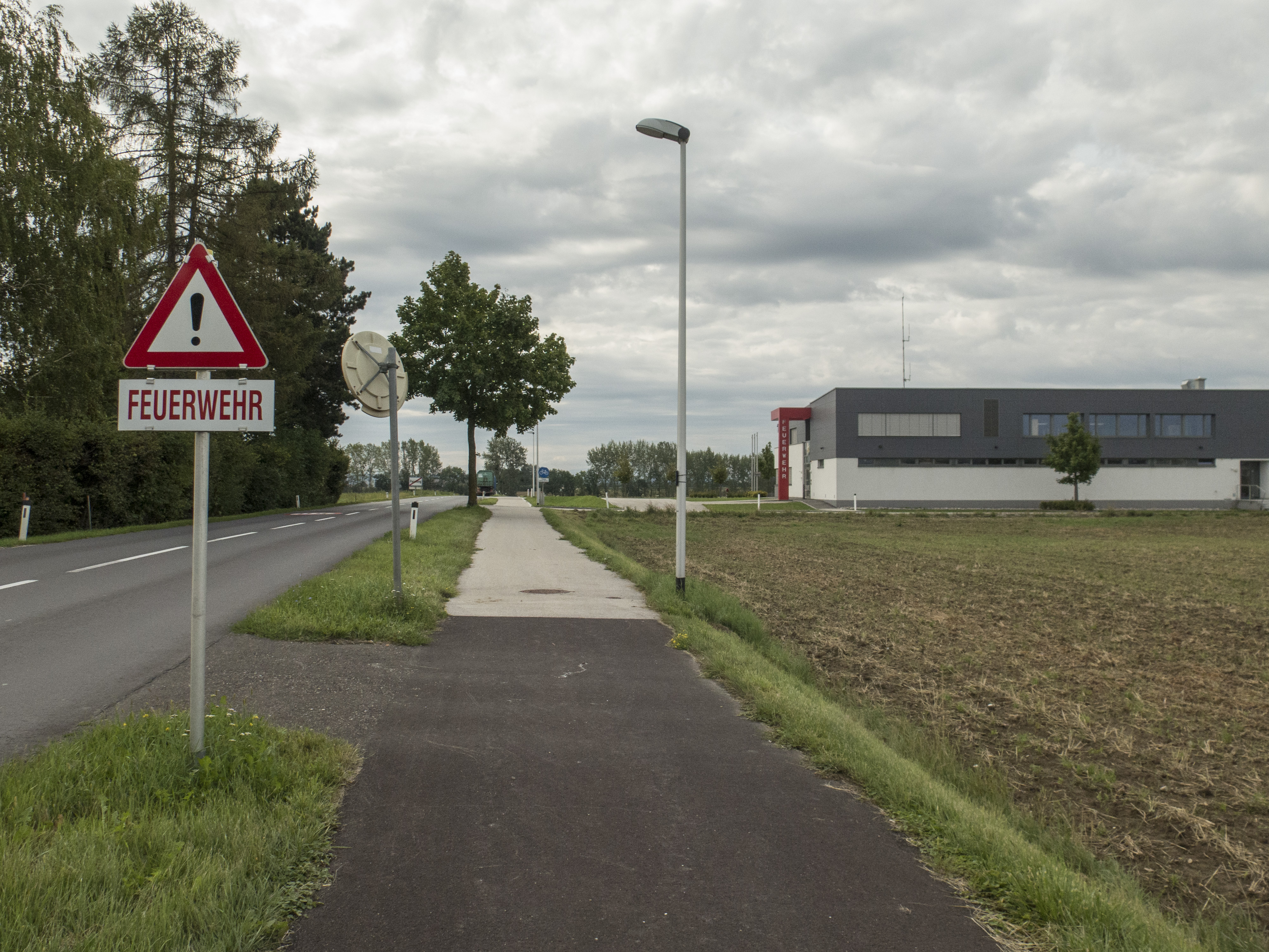 das neue Feuerwehrdepot von Pasching an der Straße nach Langholzfeld